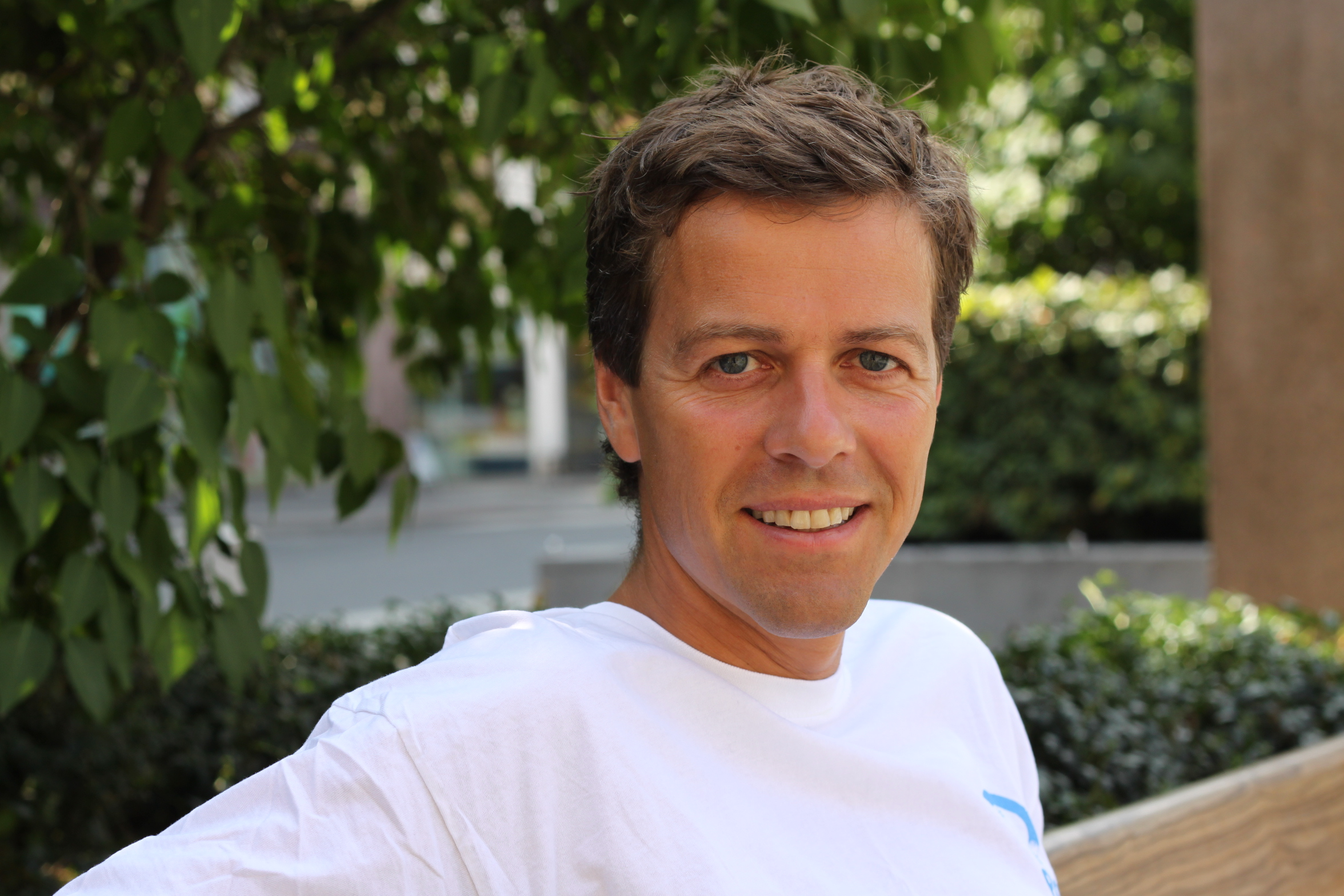 Stortingsrepresentant og leder for KrF